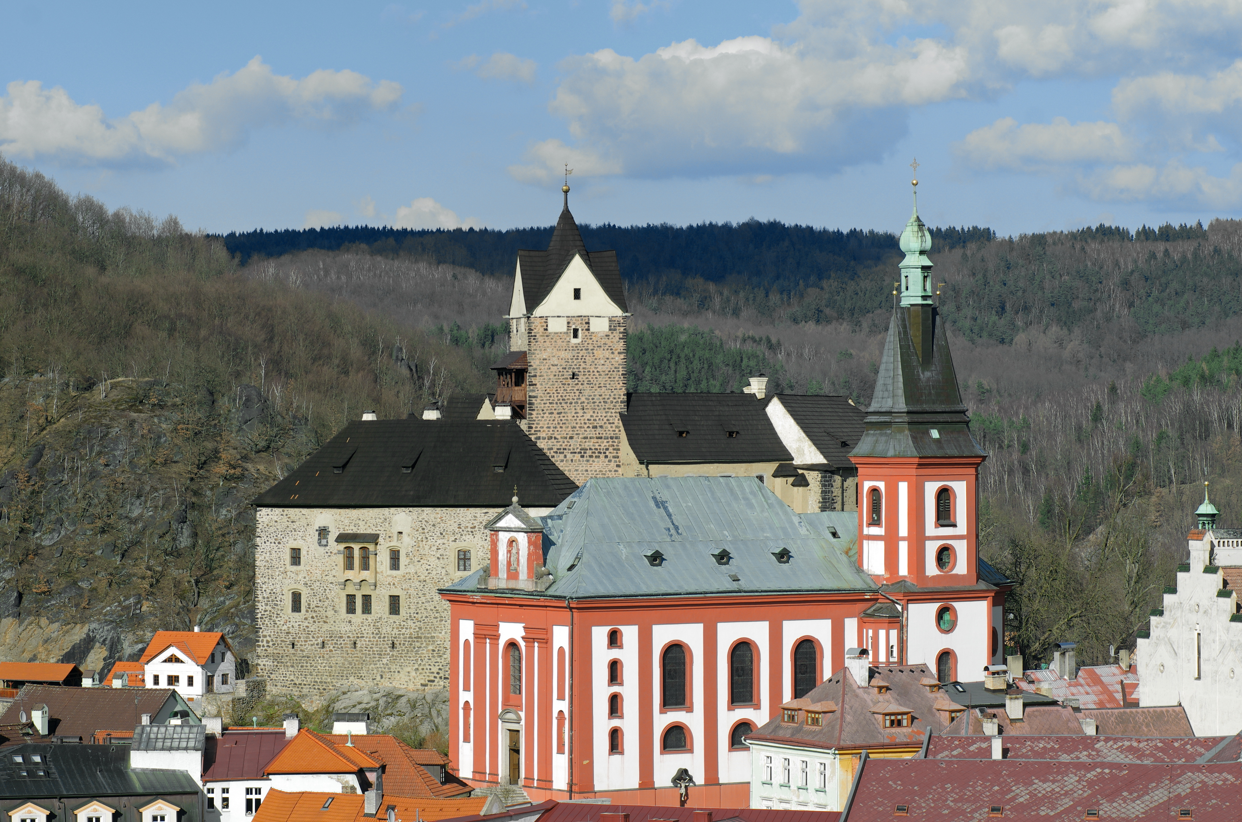 Kostel svatého Václava, Kostelní 14/3, Loket (okres Sokolov).